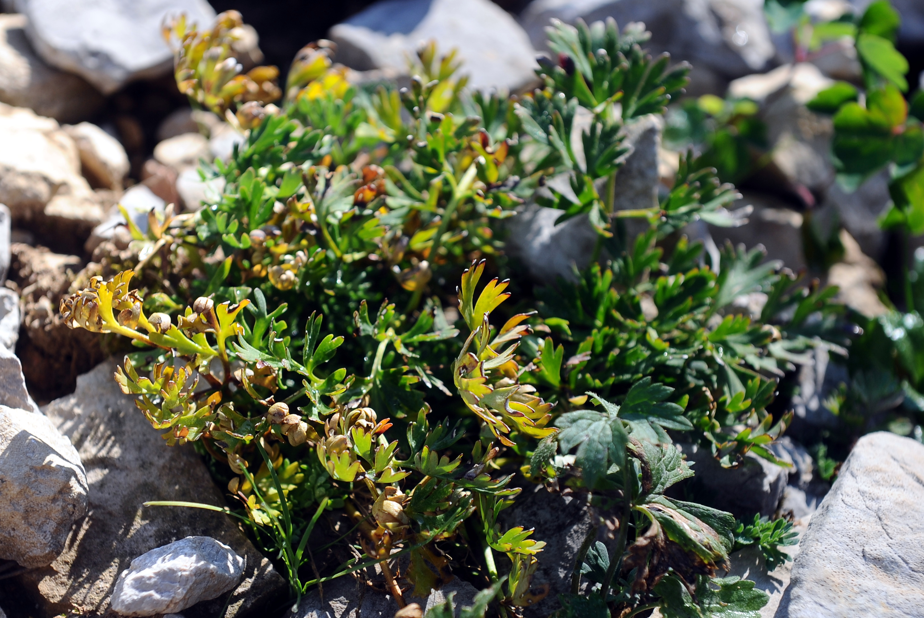 Callianthemum kernerianum - Giardino Botanico Alpino Viote